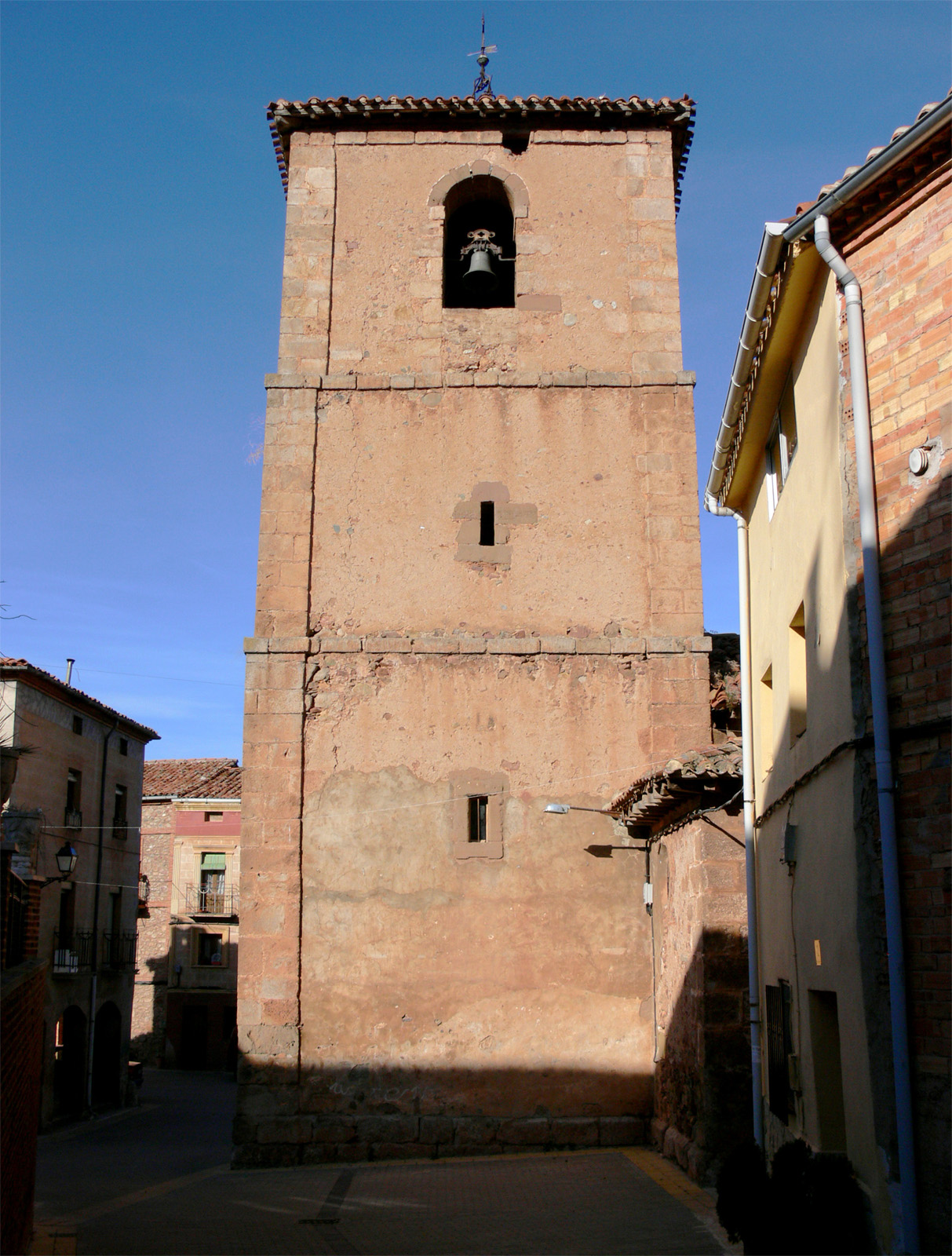 Iglesia de Nuestra Señora de la Expectación en Estollo, La Rioja - España.